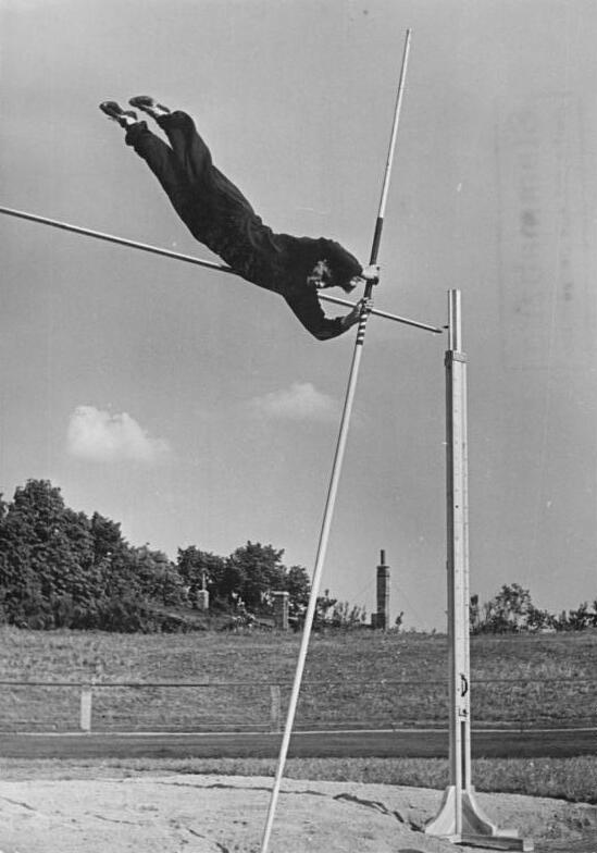 Leipzig, DHfK, Stabhochsprung Zentralbild Illner 19.5.1953 Wer studiert an der Deutschen Hochschule für Körperkultur in Leipzig? Befähigte Kinder von Arbeitern und Bauern aus allen Teilen der Deutschen Demokratischen Republik studieren an der Deutschen Hochschule für Körperkultur in Leipzig, um eines Tages als Sportlehrer und Sportmeister den demokratischen Aufbau in der DDR zu unterstützen. UBz: Gerhard Geitner aus Torgau trainiert für den Leistungssport, um an Wettkämpfen teilzunehmen. 1952 wurde er im Stabhochsprung zweiter Juniomeister der DDR. Seine Spezialgebiete sollen Turnen und Leichtathletik werden. Information added by Wikimedia users.Caution, this is not Torfi Bryngeirsson (a frequent error on many wp projects), but "Gerhard Geitner"